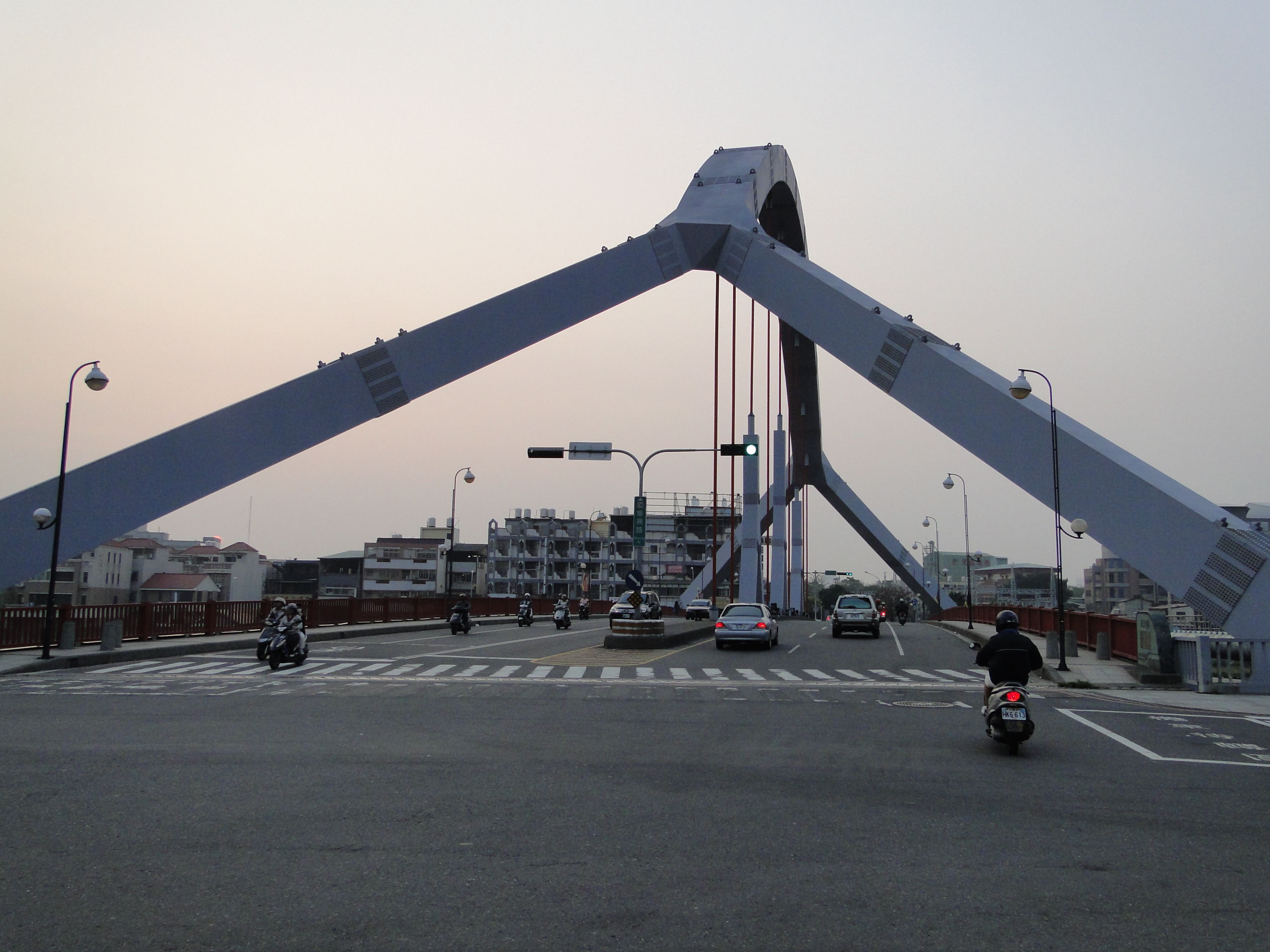 台灣台中市東門橋一景